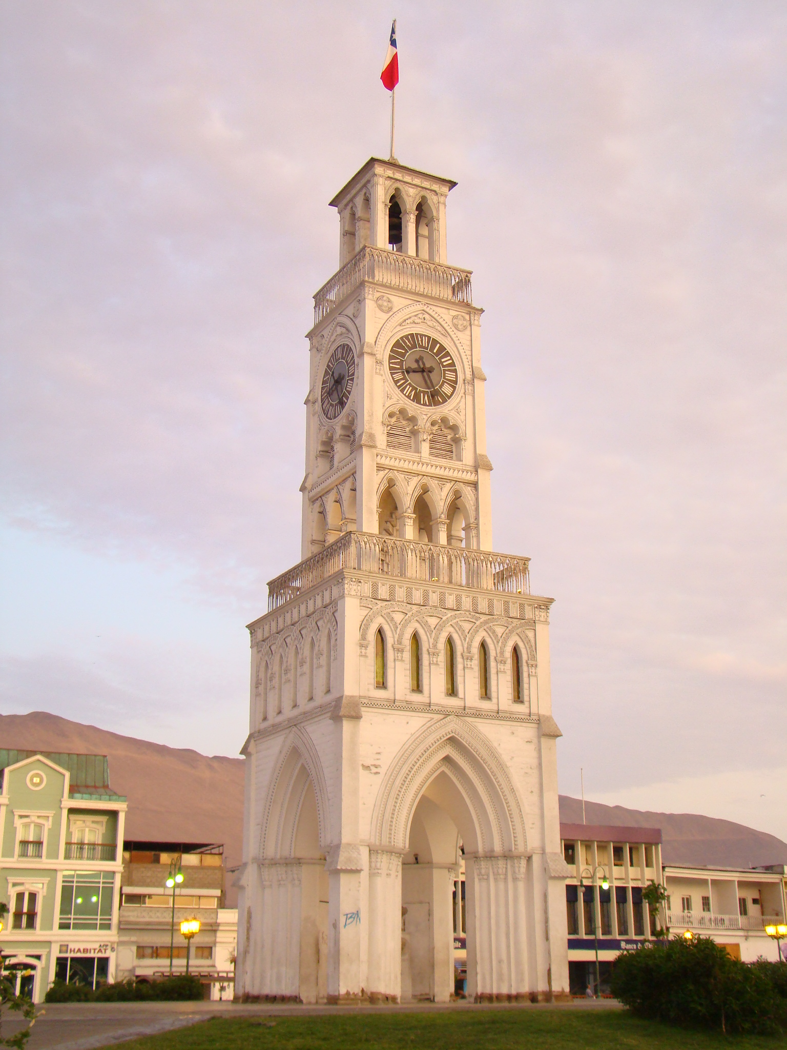 Torre do Relógio em Iquique